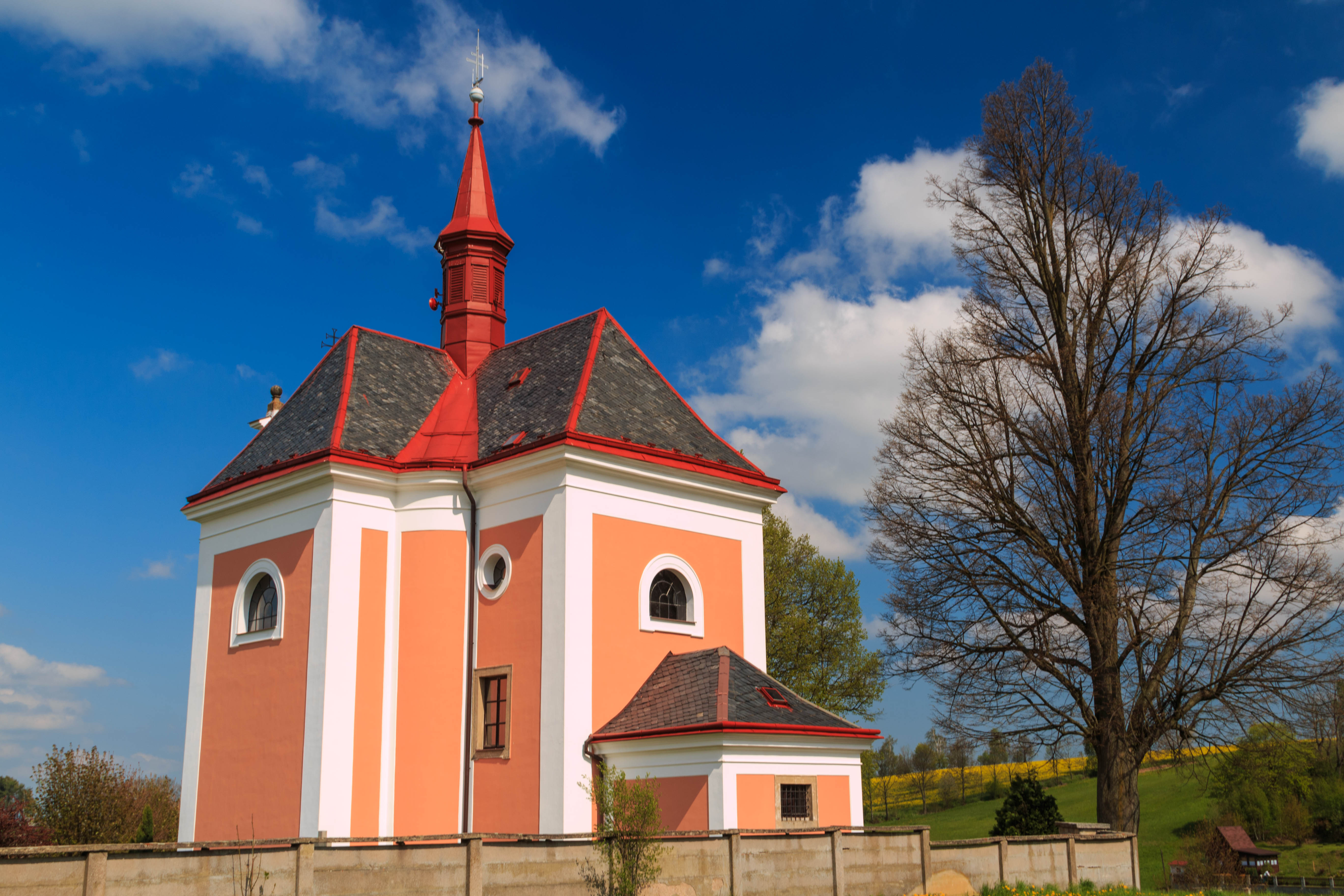 Kostel svaté Anny, Pustá Kamenice.